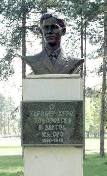 Биста на Вангел Тодоровски во Градскиот парк во Битола